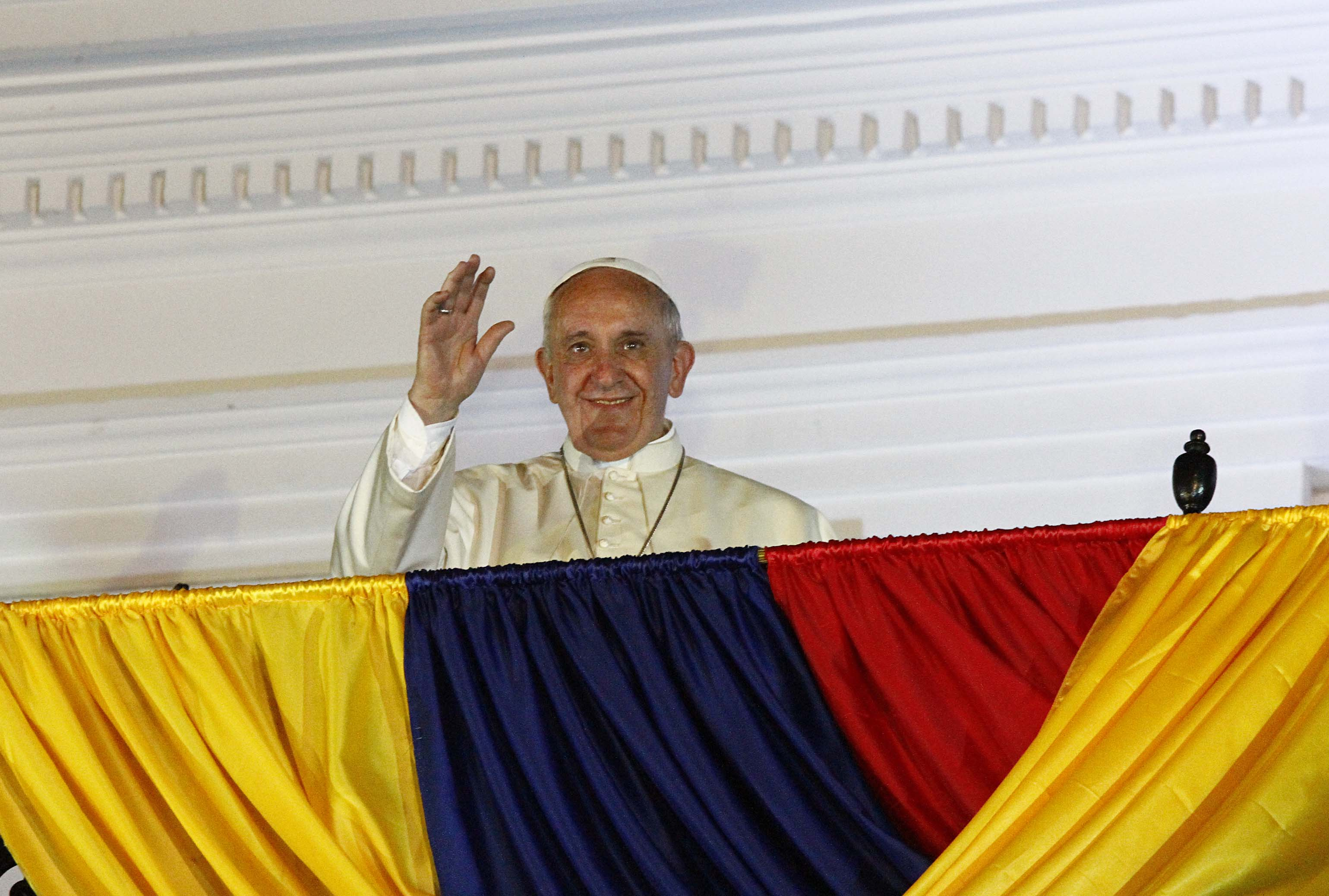 Quito, 06 jul (Andes).- El papa Francisco visitó el palacio de Carondelet donde mantuvo una reunión con el presidente de la República Rafael Correa. A su llegada se acercó al balcón para saludar y bendecir a los miles de fieles que se dieron cita en la Plaza Grande. ANDES/Micaela Ayala V.